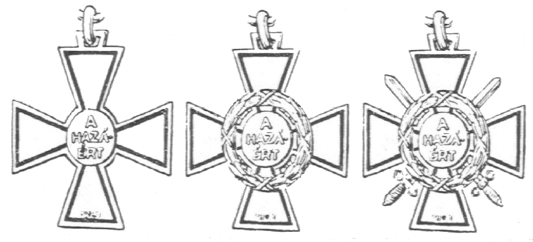 Darstellung aller drei Klassen des Frontkämpferkreuzes (Ungarn)